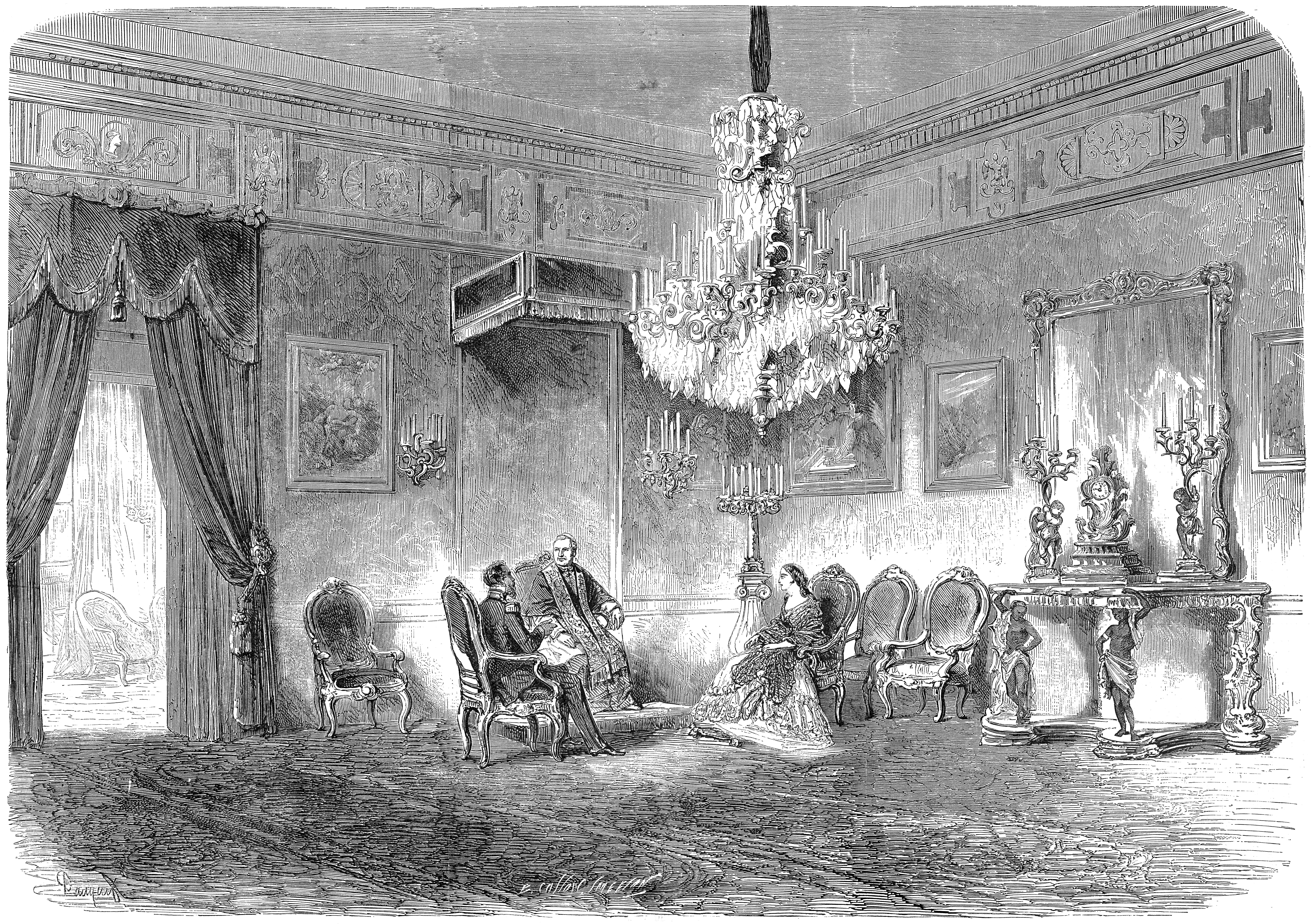 Visite de l’empereur Maximilien et de l’impératrice Charlotte du Mexique au pape Pie IX, Palais Marescotti (Vatican), le 19 avril 1864. — Maximilien et Charlotte ont une conversation avec le pape et à la fin de celle-ci, ils reçoivent sa bénédiction. Après cette visite, ils s’embarqueront pour le Mexique. Charlotte porte une robe noire et une mantille d’étiquette sur la tête, tandis que Maximilien est en uniforme.